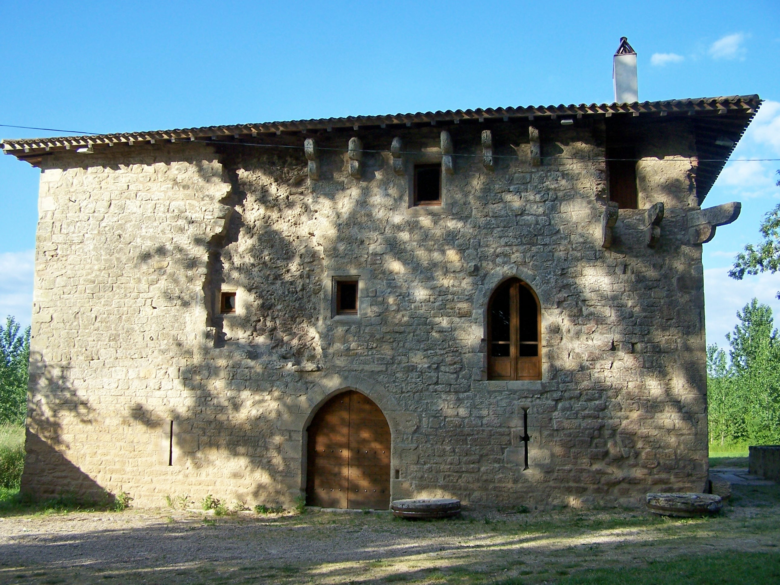 Moulin de Piis à Bassanne, Gironde, France